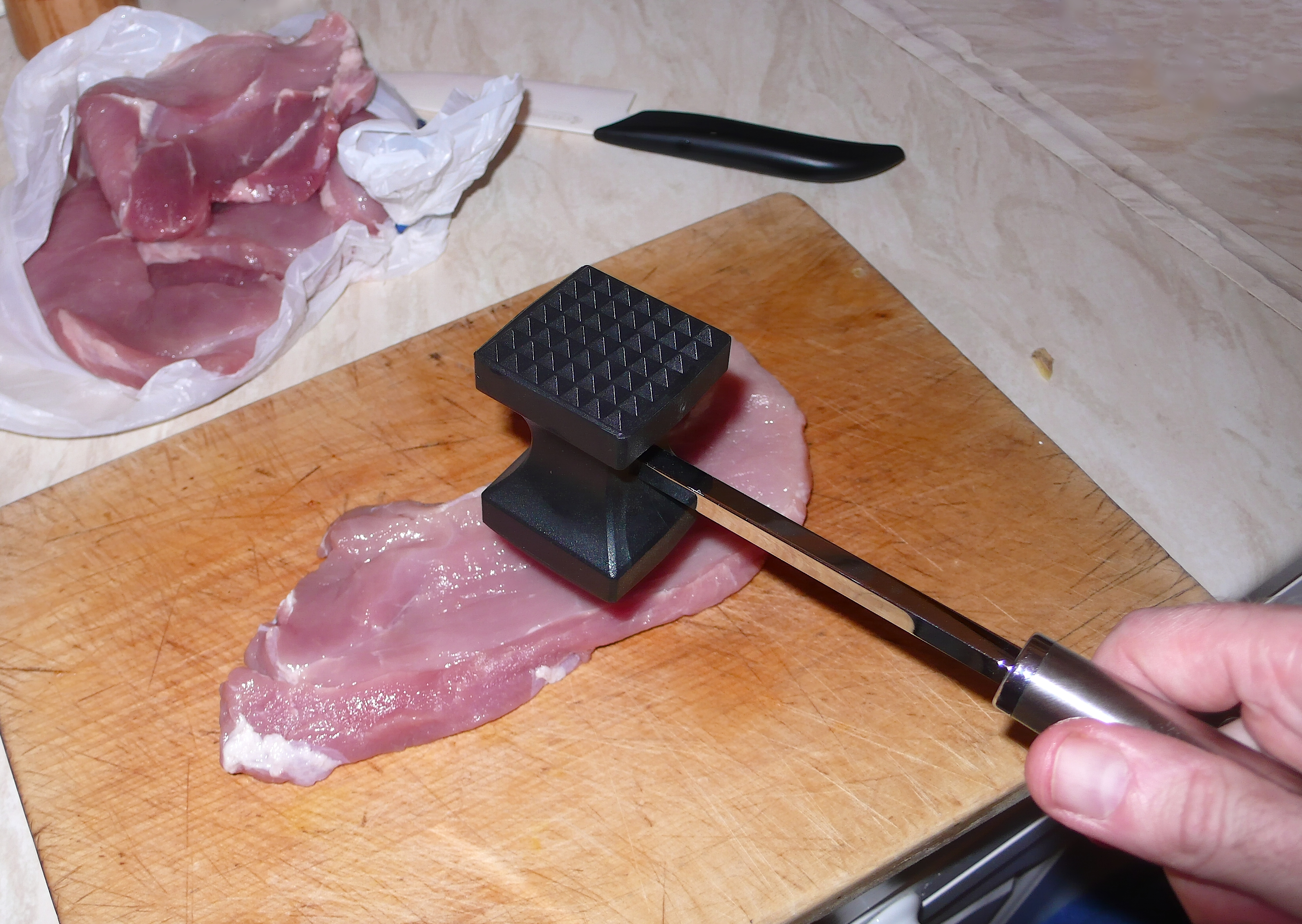 Plattieren von Schweinesteaks mit Hilfe eines Fleischklopfers.